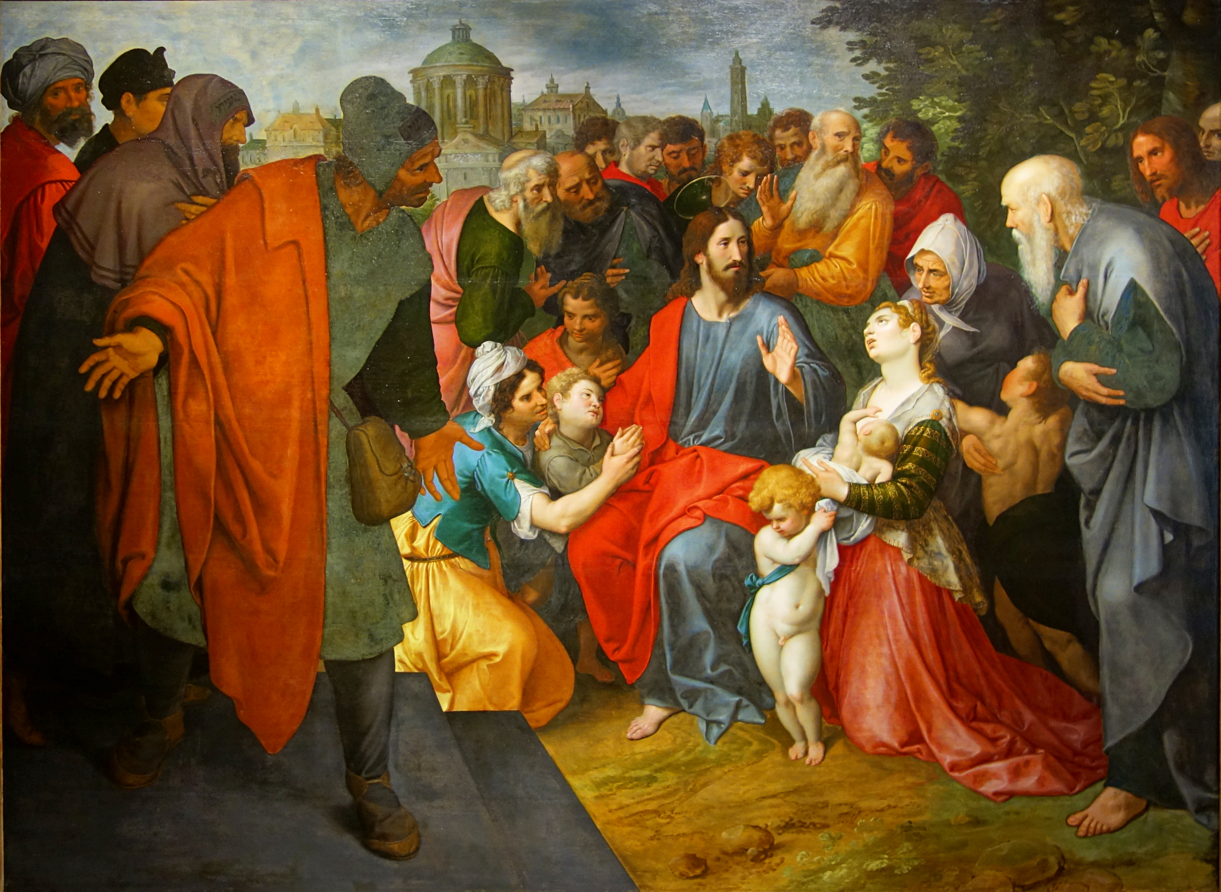 Christ bénissant les enfants au Bonnefantenmuseum de Maastricht.